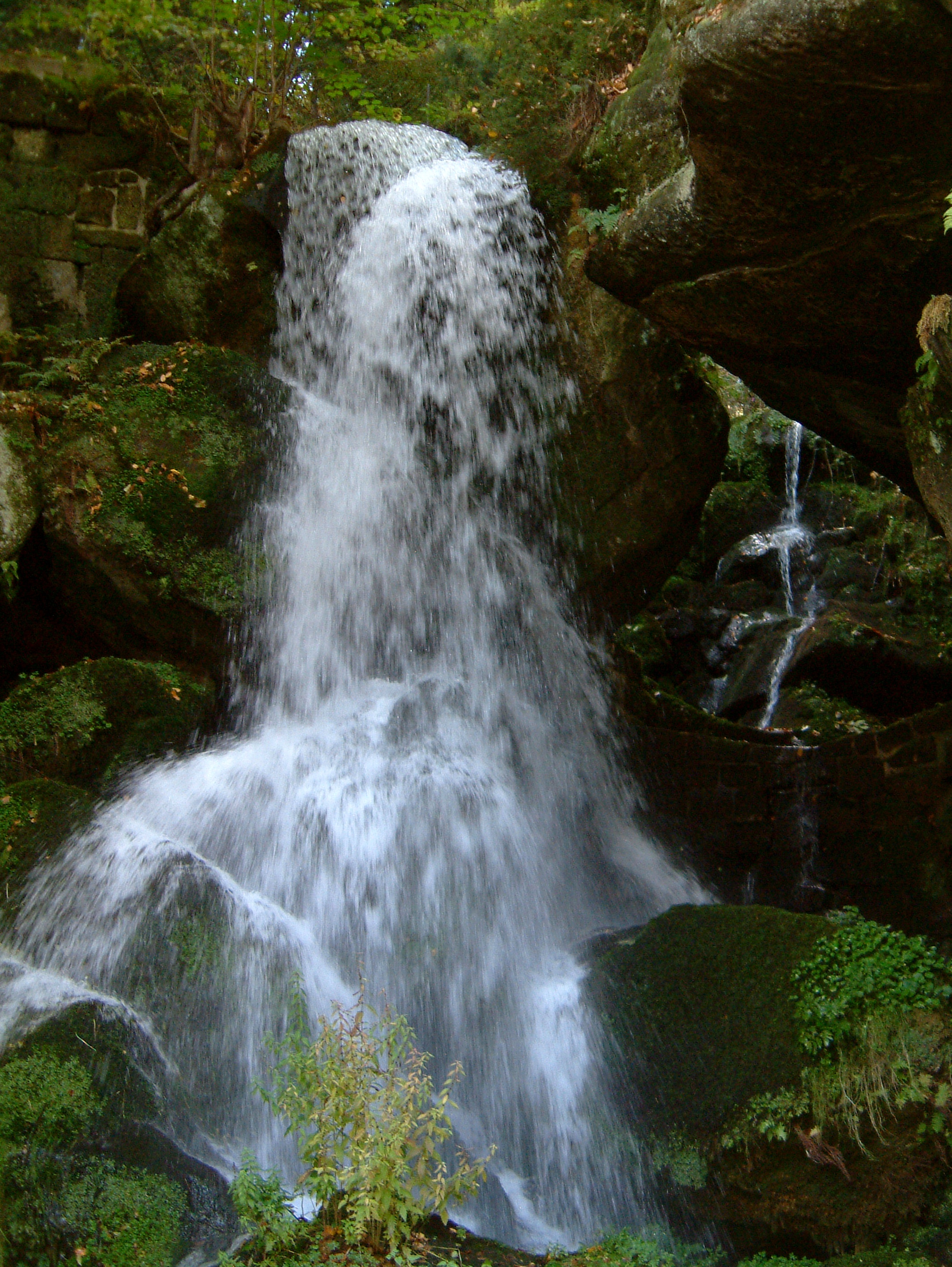 Lichtenhainer Wasserfall - Atemberaubend: Tagsüber im 30-Minutentakt wird das angestaute Wasser des Lichterhainer Dorfbaches unter den Klängen eines erhebenden Hymnus "geflutet".